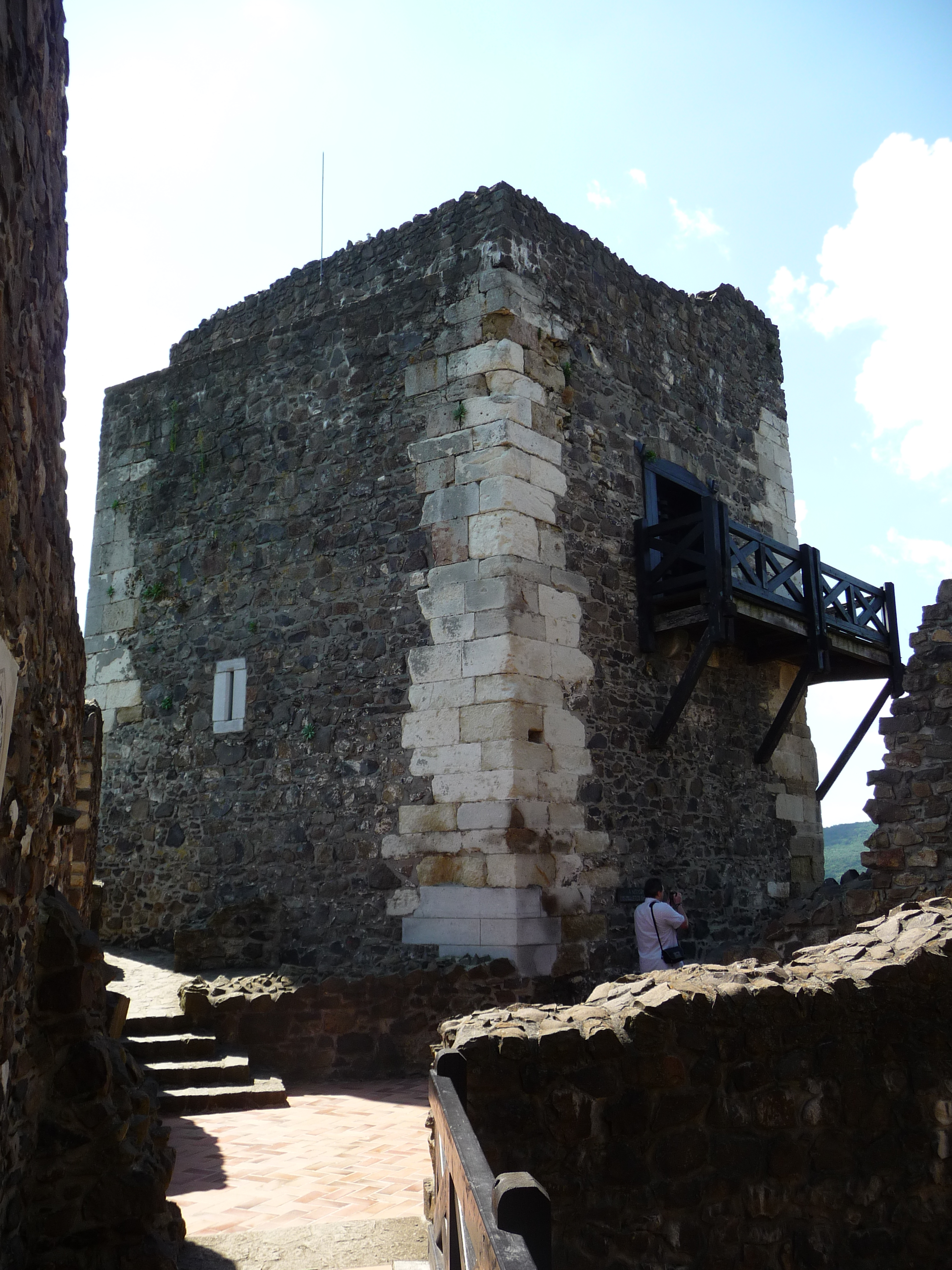 A hollókői vár öregtornya